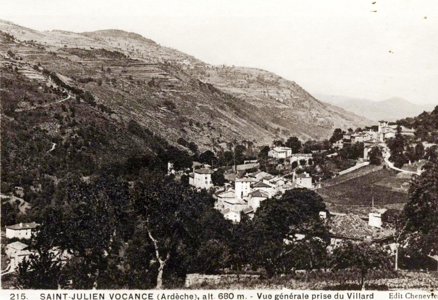 Saint-Julien-Vocance CP